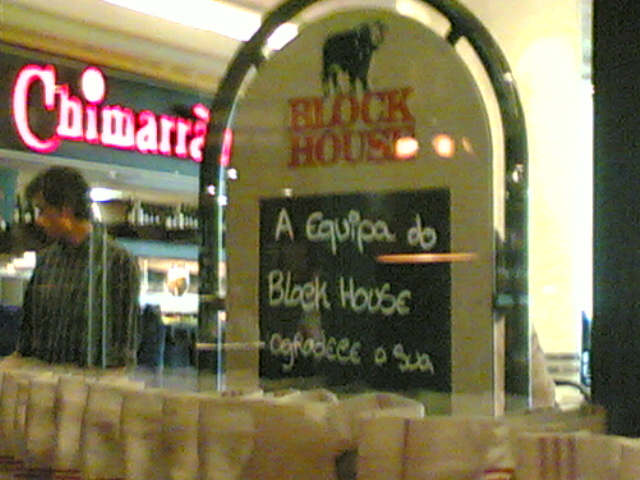 Bock House restaurant, Oeiras, Portugal